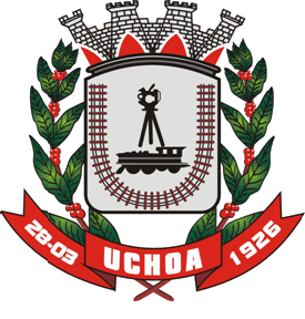 Brasão da cidade de Uchoa, SP